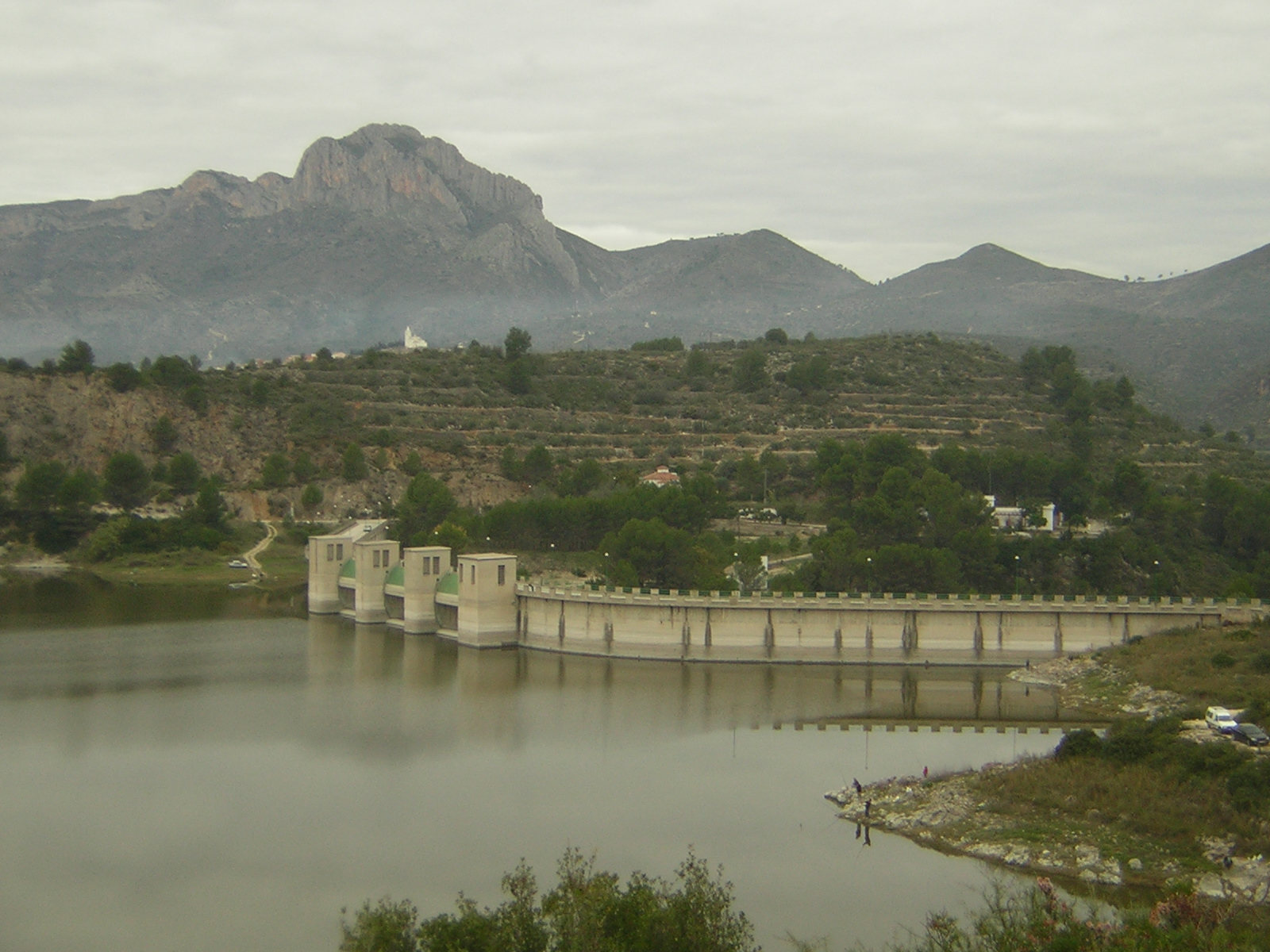 Presa del embalse de Beniarrés por detras